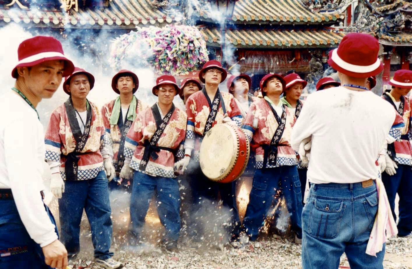 又稱「炸轎」。當神明繞境遊行或進香活動時，信徒在神轎下方堆滿鞭炮後燃放來迎接神明到來。由於信徒深信鞭炮燃放越多神明越高興，因此所堆放的鞭炮數量往往十分驚人，點燃後炮聲震耳、火光刺眼、濃霧蔽天、炮屑紛飛、硝煙刺鼻，但神轎和周邊所有轎班人員均需挺立不動，以展現其無畏無懼精神。 此照片攝於2001年高雄朝后宮往北港朝天宮進香謁祖時，拍攝地點即在北港朝天宮正門前，此時腳下鞭炮剛點燃，所有轎班人員神色肅然迎接即將出現的大量鞭炮爆炸洗禮。